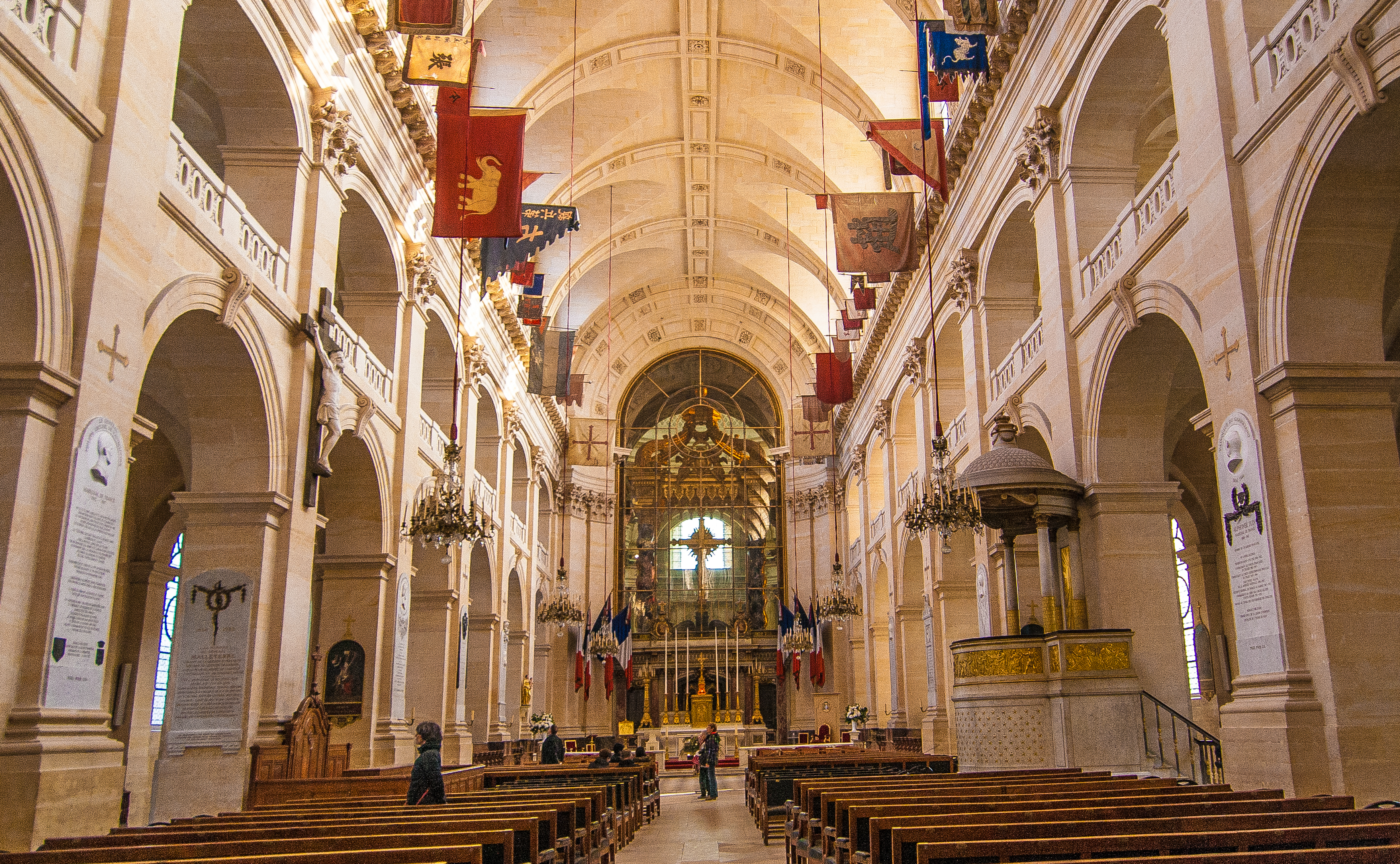 Cathédrale Saint-Louis des Invalides .